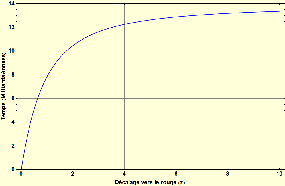 Temps de regard en arrière (Lookback Time) en fonction de z